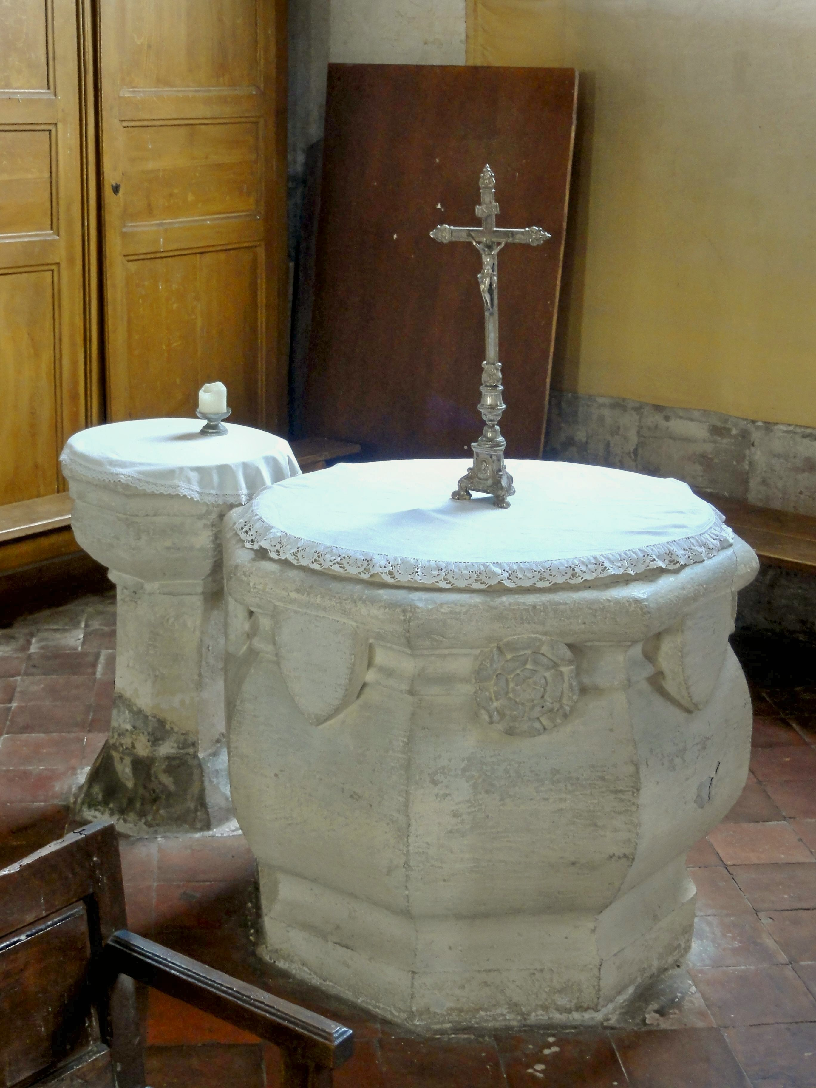 Les fonts baptismaux et la piscine liturgique.